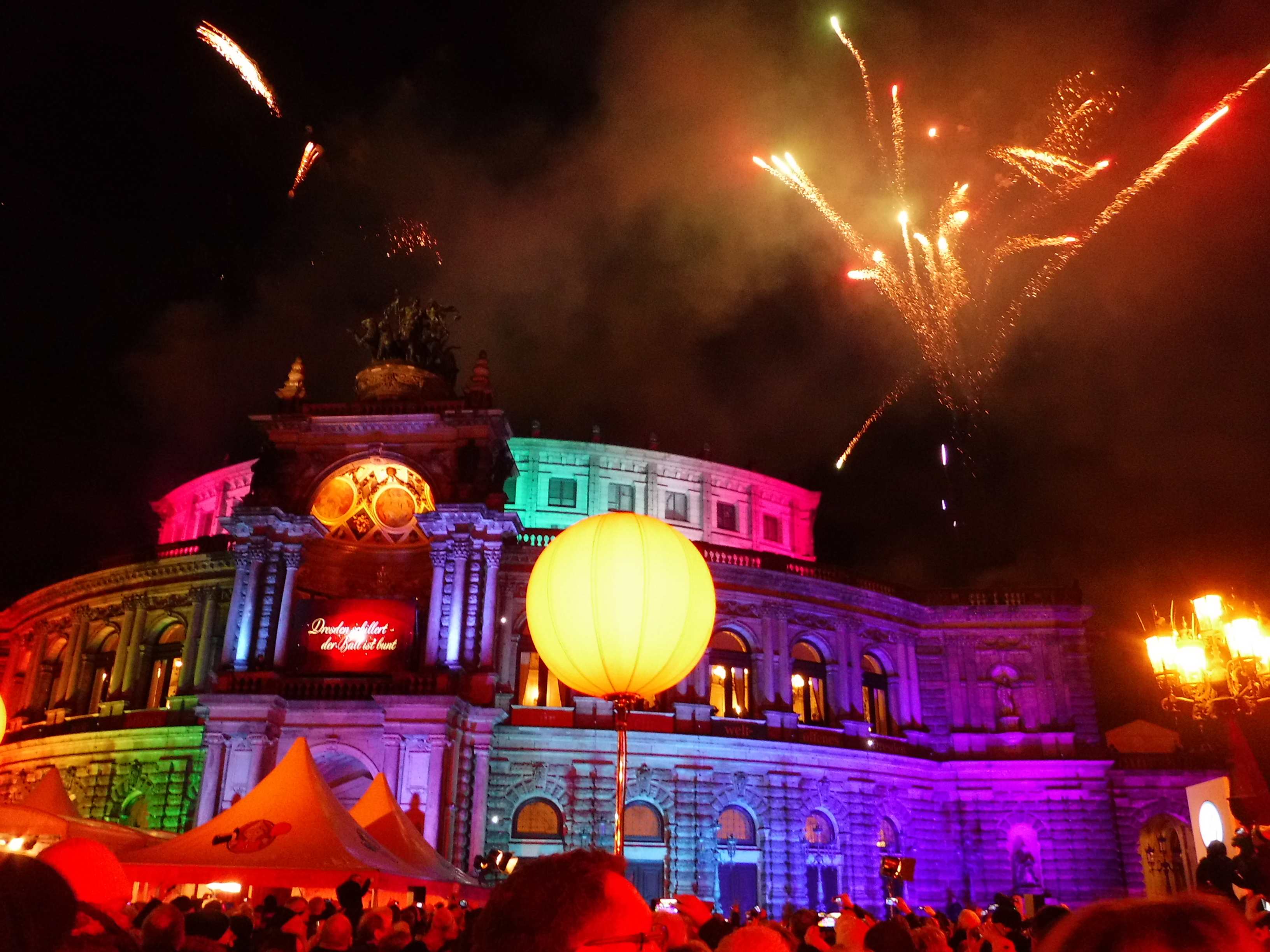 SemperOpenairball vor der Semperoper mit Übertragung des SemperOpernballs